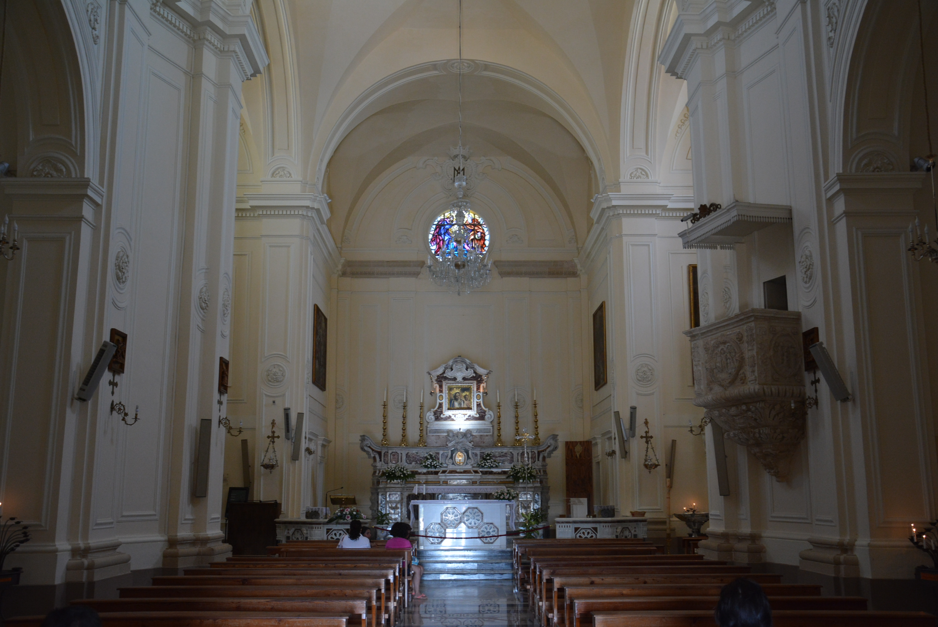 Basilica di Santa Maria de Finibus Terrae